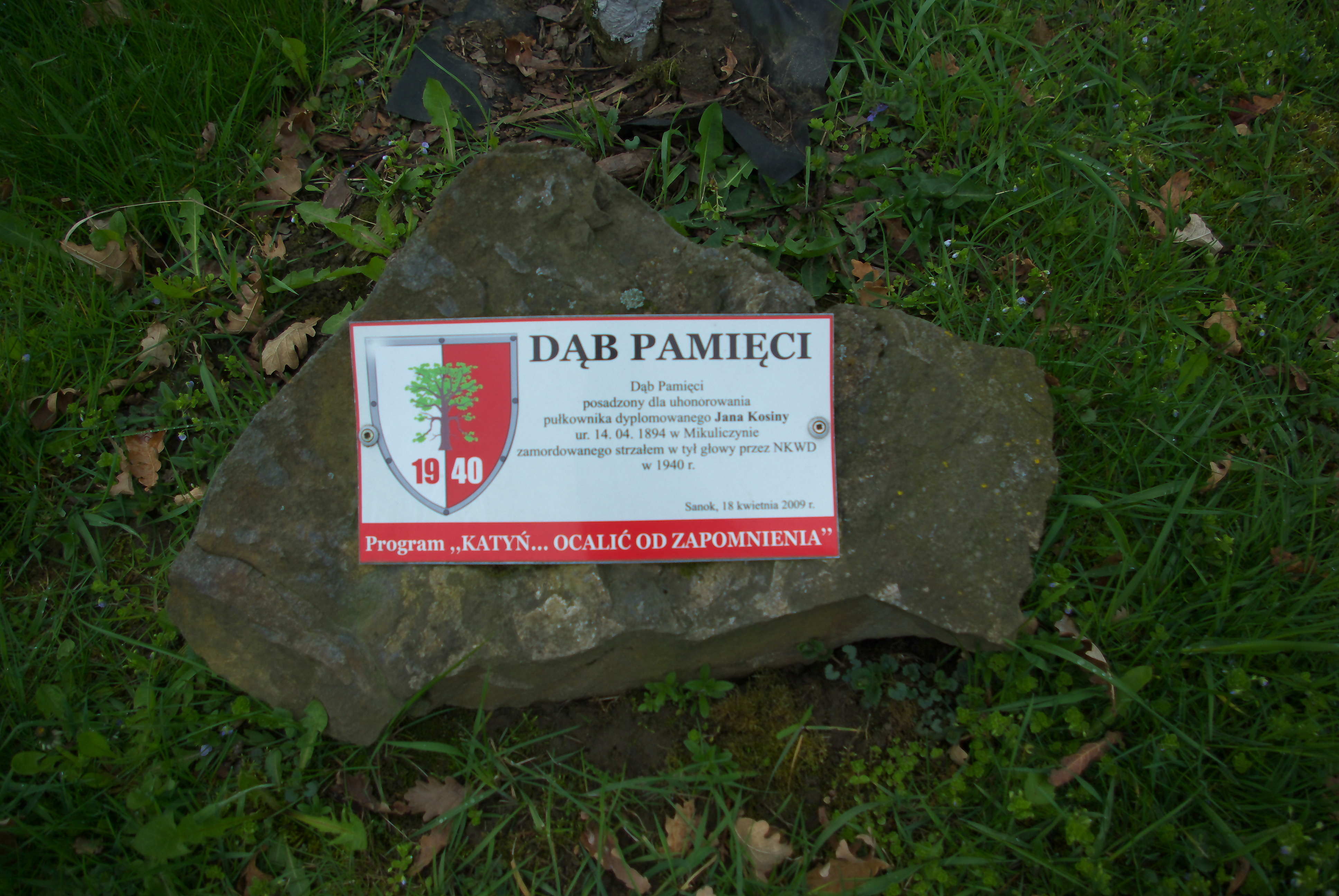 Kamień pamiątkowy przy Dębie Pamięci honorującym Jana Kosinę na Cmentarzu Centralnym w Sanoku